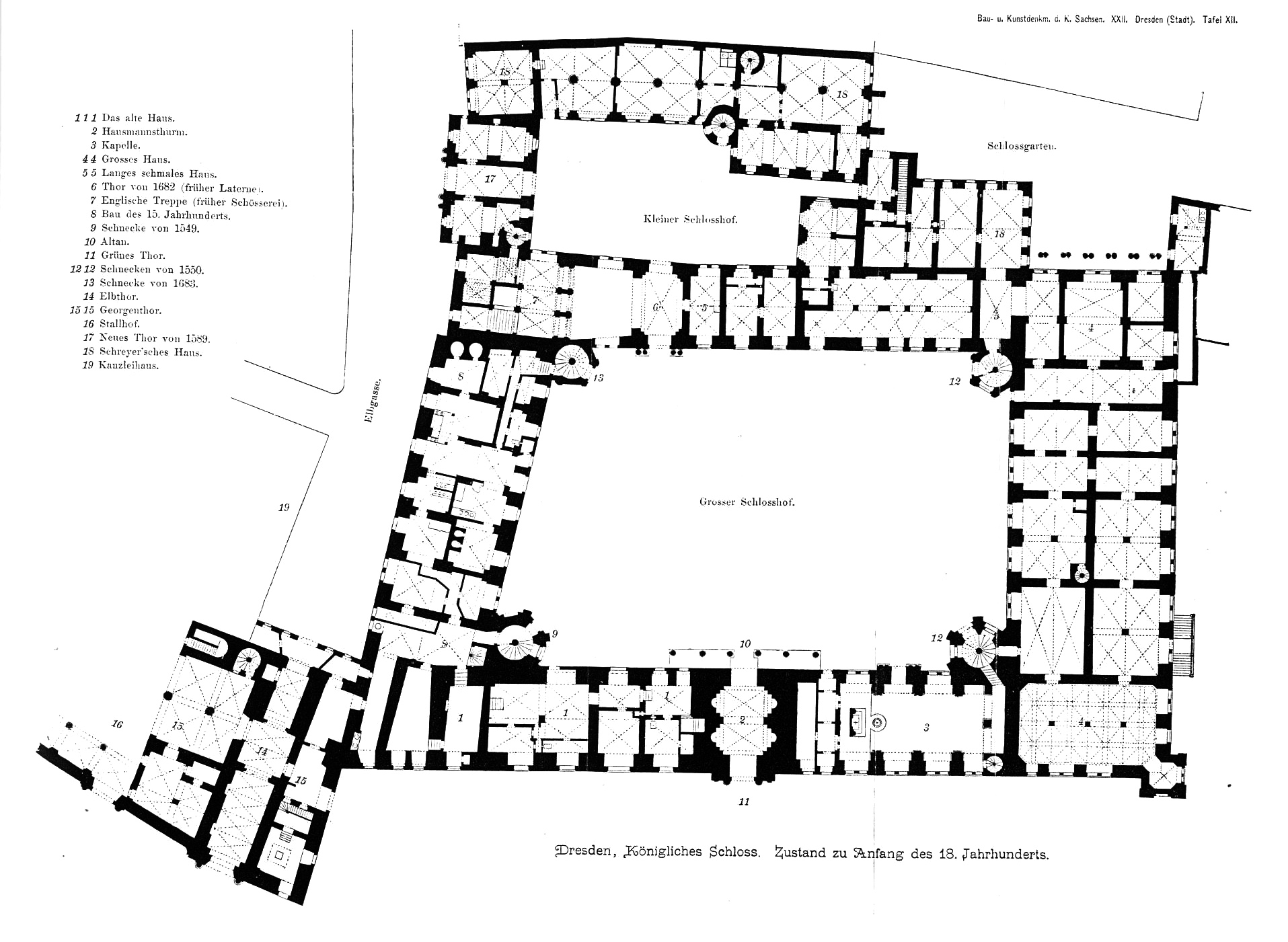 Erdgeschossgrundriss des Residenzschlosses in Dresden um 1700. Umzeichnung aus älteren Quellen in dem Kunstdenkmälerinventar zu Dresden aus dem Jahre 1901.